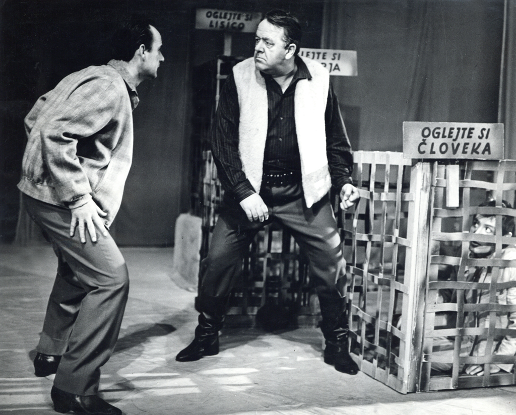 Richard N. Nash, Oglejte si jaguarja!, SNG v Mariboru. Na fotografiji: Arnold Tovornik (Brad), Zlatko Šugman (Dave Ricks), Ivo Leskovec (Wally Wilkins).